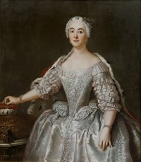 Porträt der Gisela Agnes von Anhalt-Dessau (1722-1751) als Kniestück im silbernem Brokatkleid. Das Kleid ist tief ausgeschnitten und mit Schleifen geschmückt, ebenso die Ärmel. Um die Schultern liegt ein Hermelinmantel. Die weiße Lockenperücke ist mit Blüten geschmückt. Ihre rechte Hand ruht auf dem Fürstenhut